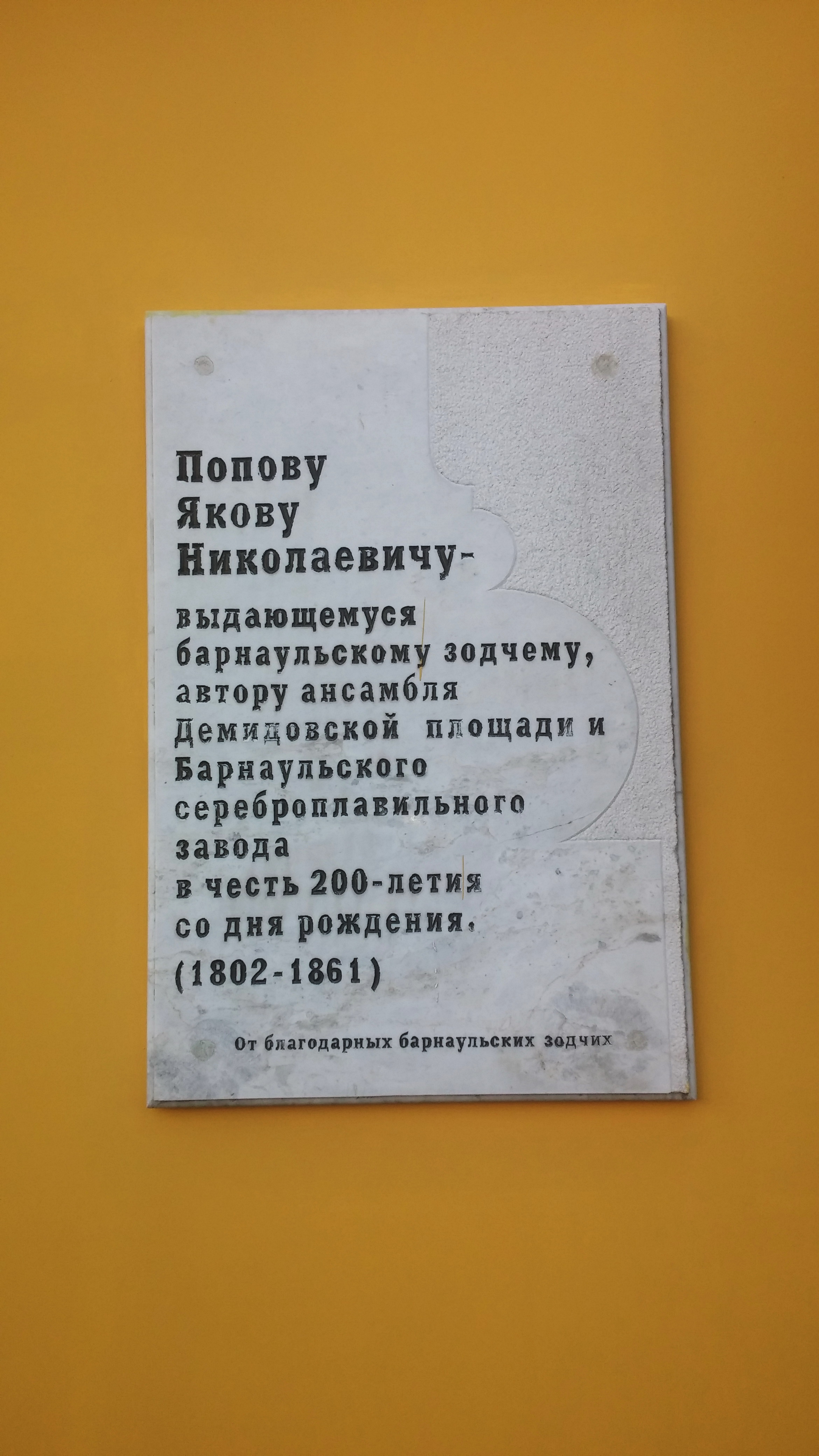 Мемориальная доска архитектору Я. Н. Попову: проспект Красноармейский, 4, Барнаул, Алтайский край